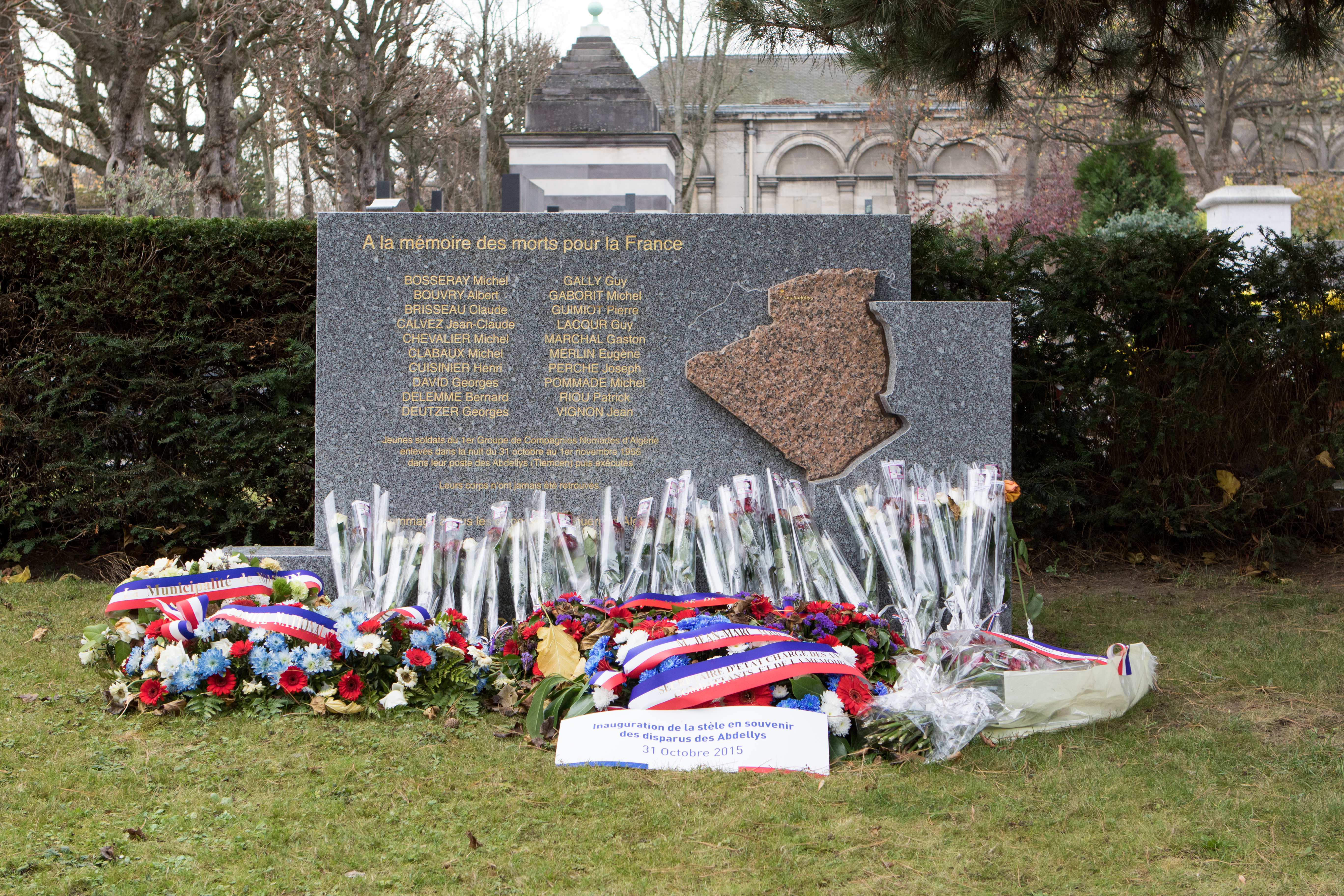 Monument aux soldats du 1er groupe de Compagnies nomades d'Algérie disparus dans la nuit du 31 octobre 1956 aux Abdellys (Tlemcent).